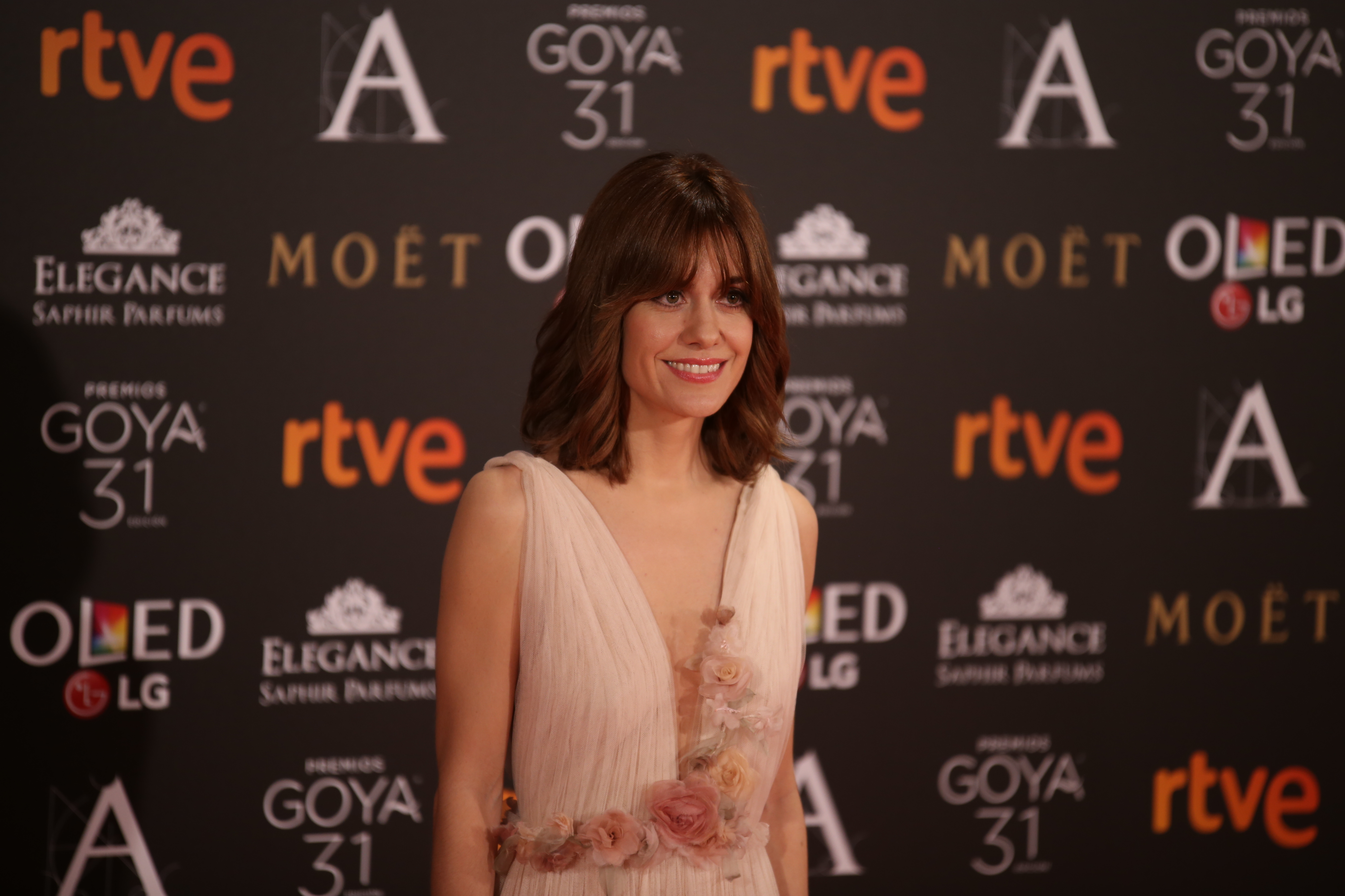 Premios Goya 2017